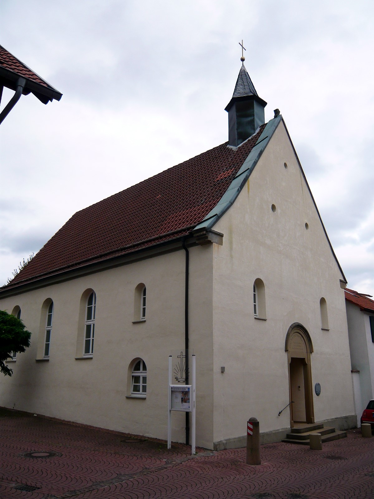 Alte Synagoge. Ehemalige Synagoge in Walldorf. 1716 erbaut von der ev. ref. Kirchengemeinde. 1861-1938 Synagoge. 1938 Verwüstung durch Anhänger des NS-Regimes. Seit 1954 Neuapost. Kirche.